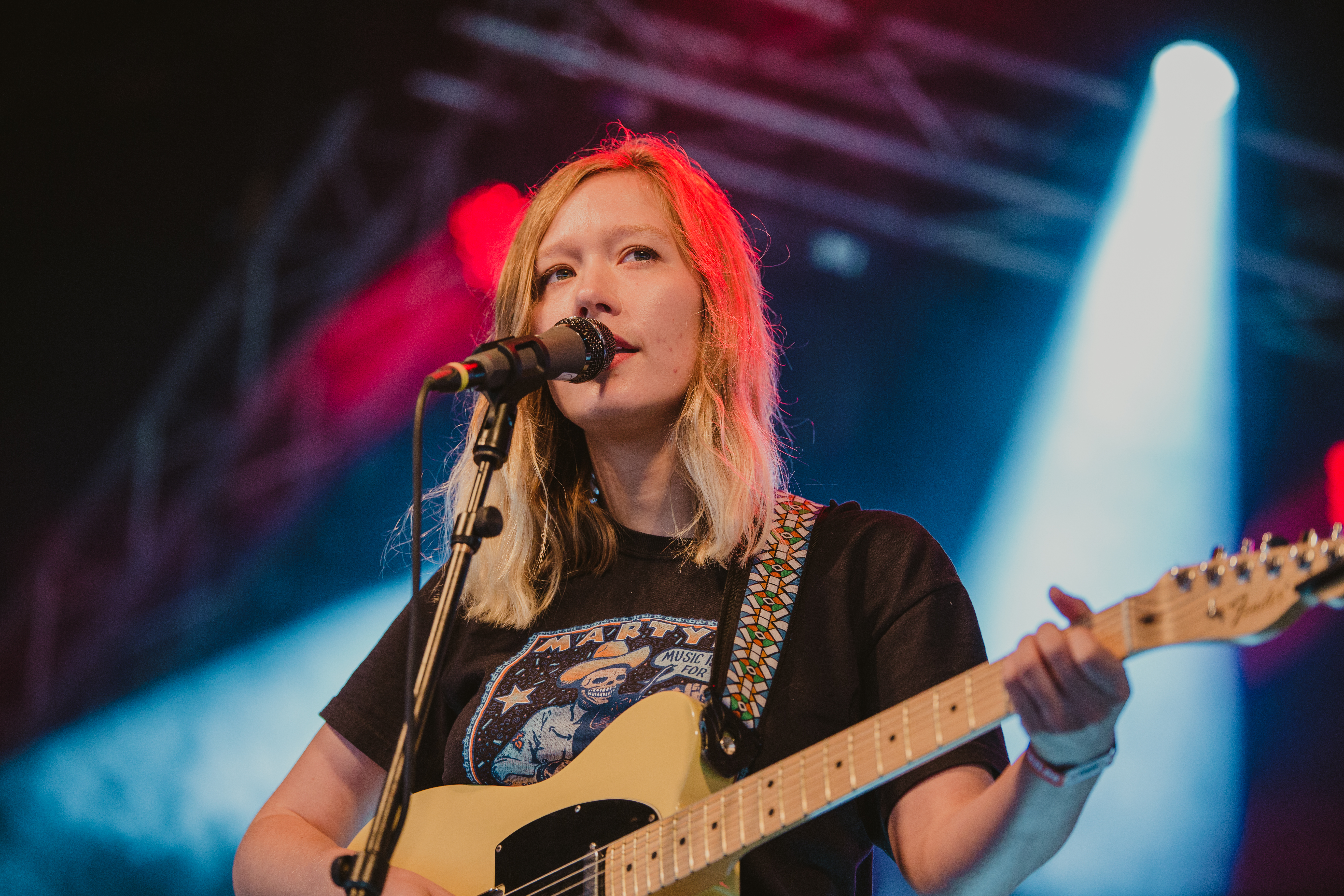 Photo: Krists Luhaers // @Kristsll